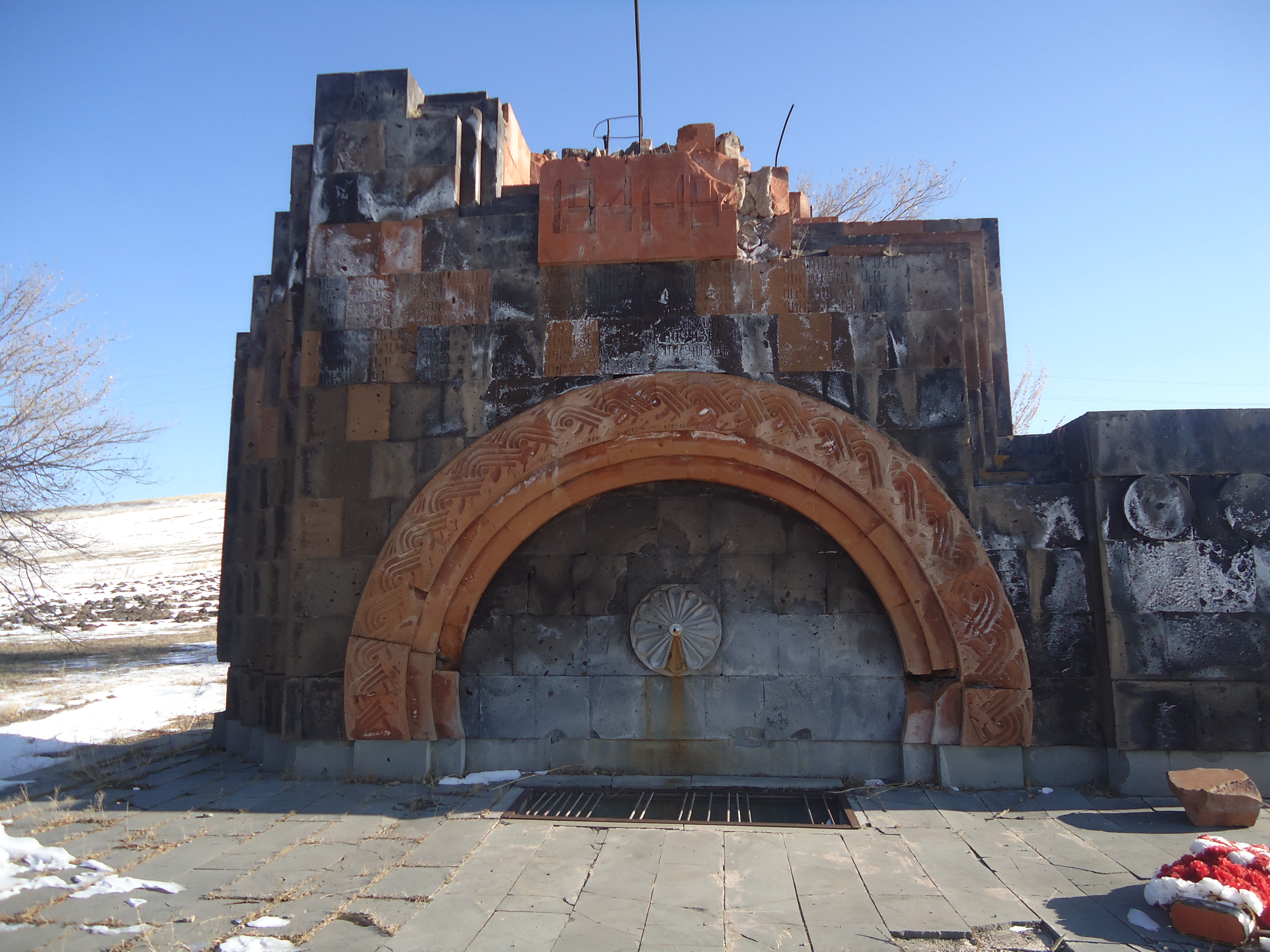 Ցողամարգ: Երկրորդ համաշխարհային պատերազմում զոհվածներին հուշարձան 1 112/7